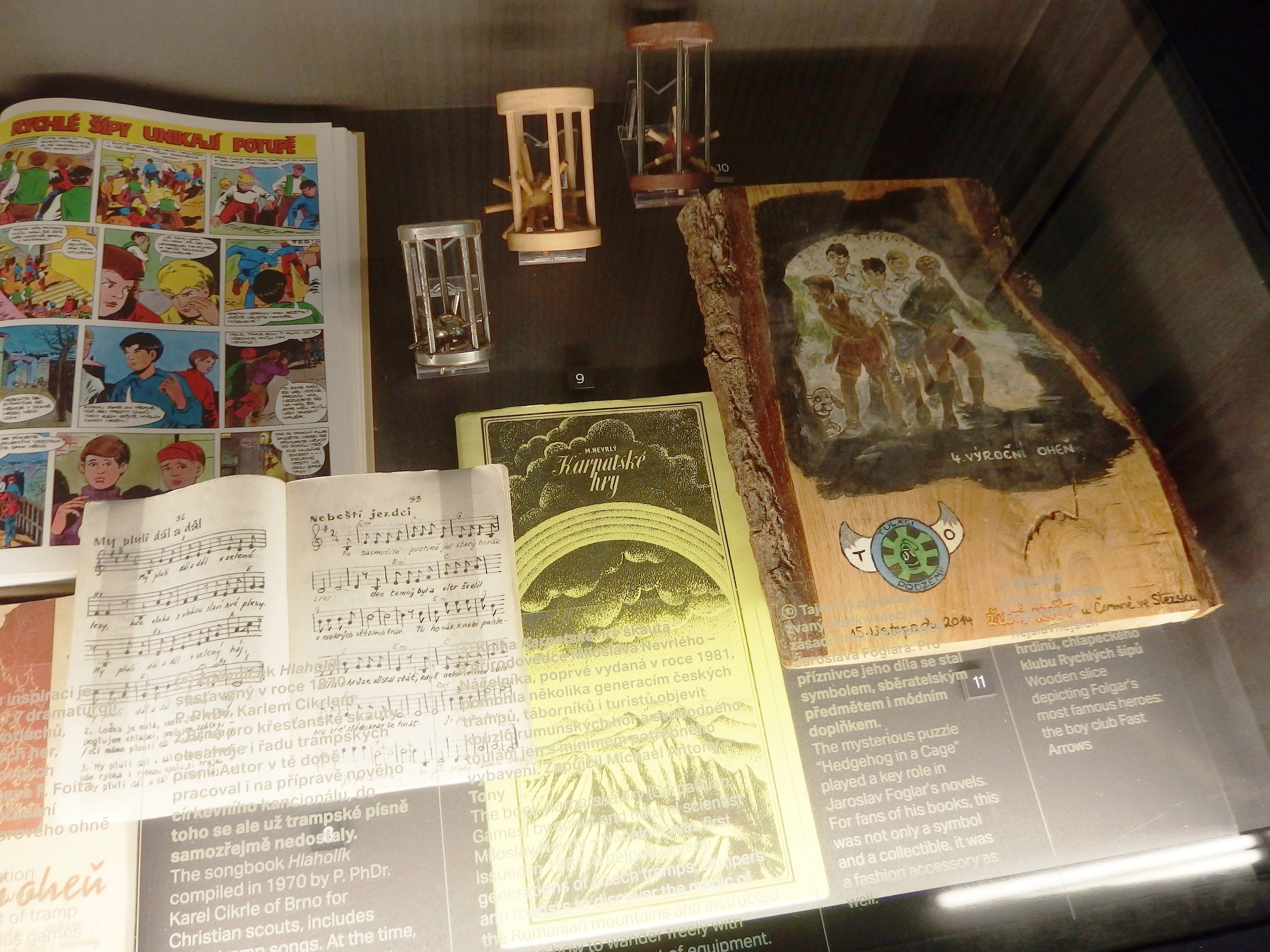 Praha, Národopisné muzeum Národního muzea, výstava Století trampingu v roce 2019.